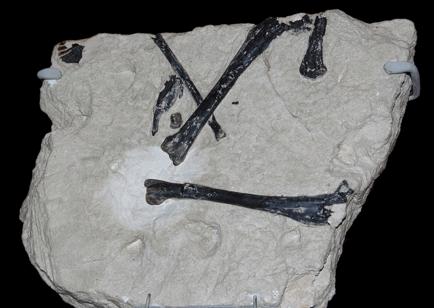 Naturhistorisches Museum Wien